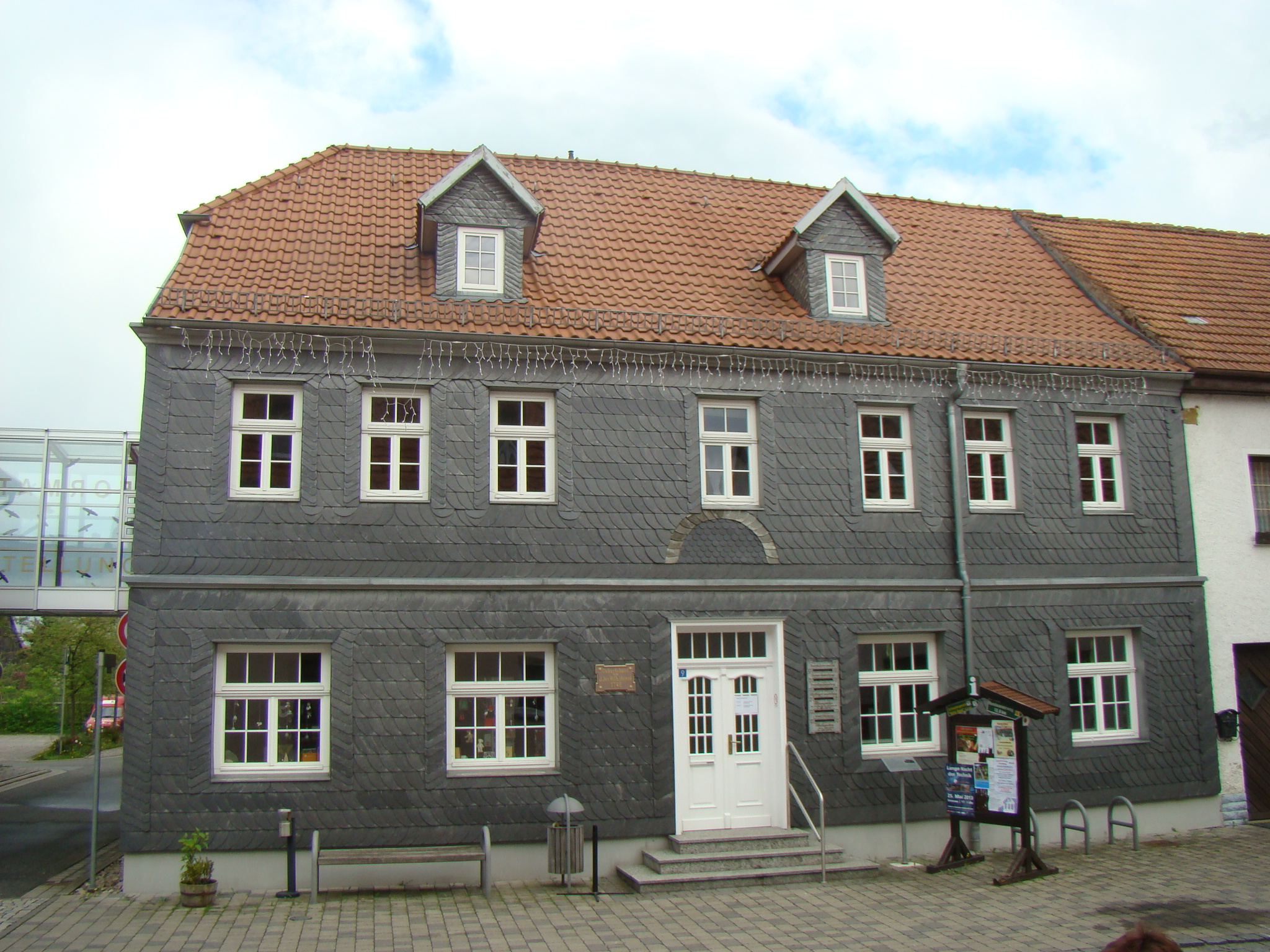 Heinse-Geburtshaus in Langewiesen